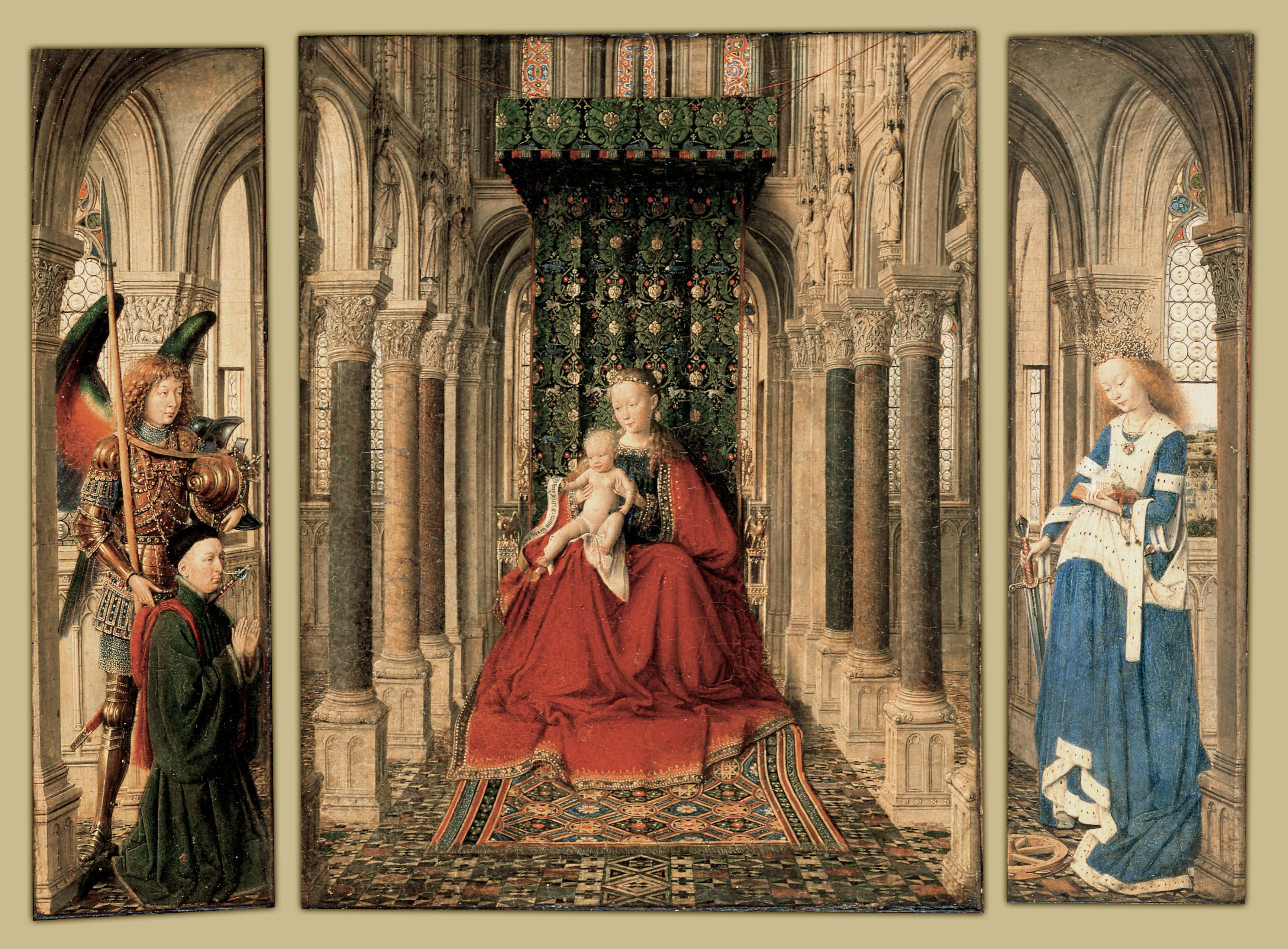 Flügelaltar